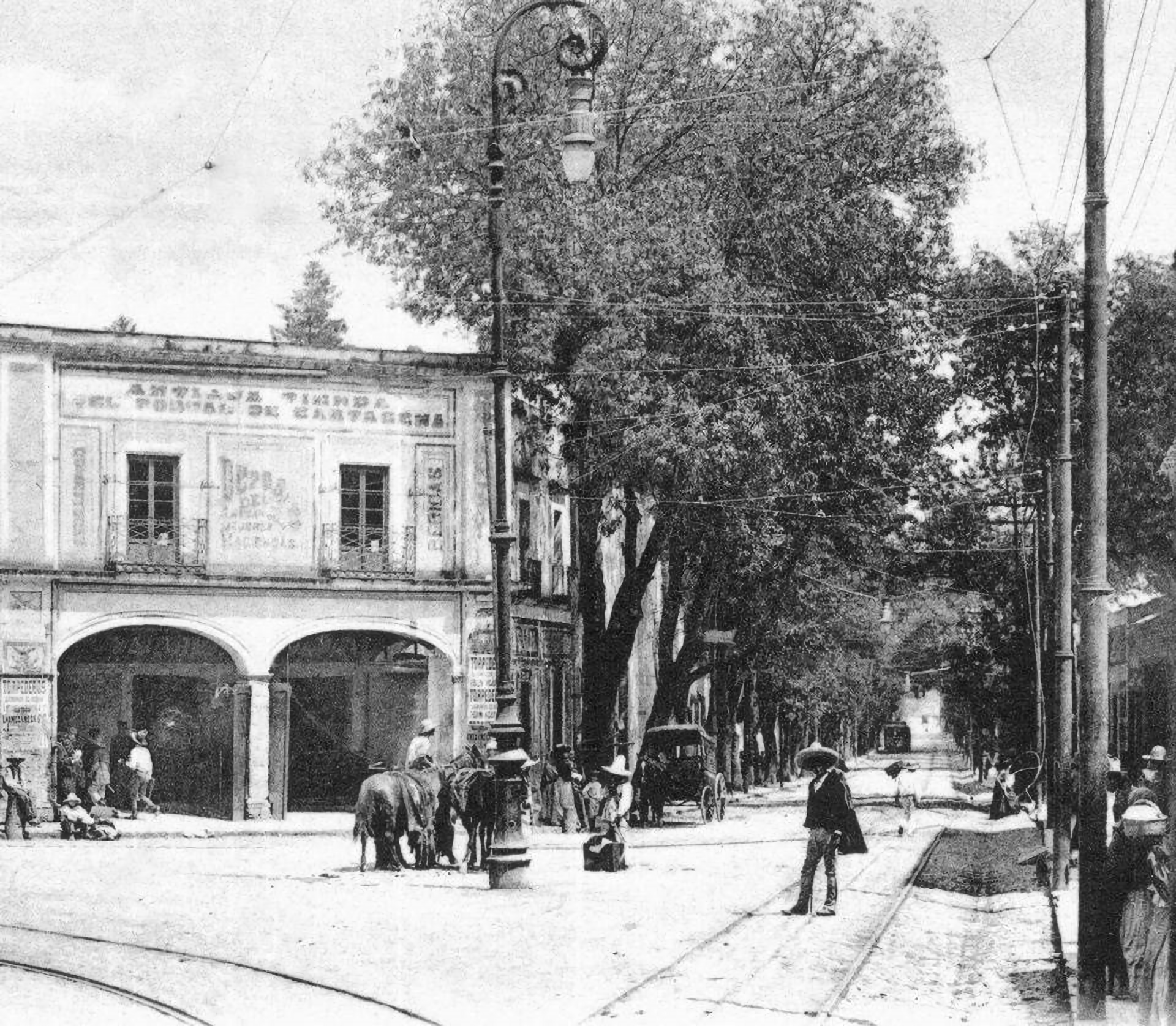 Avenida Jalisco Portal de Cartagena en Tacubaya 1919